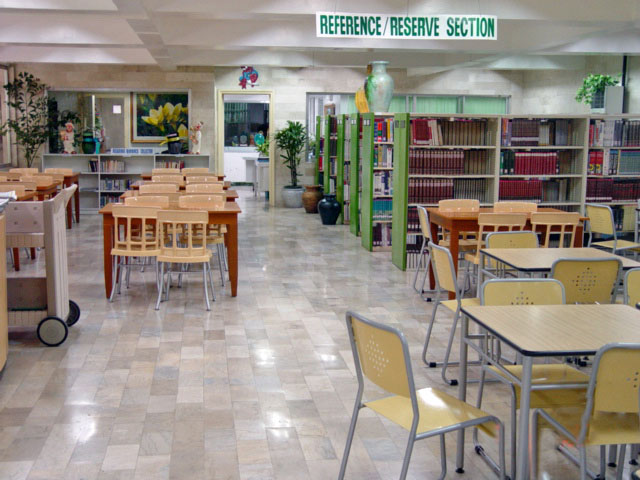 Anievas Memorial Library; De La Salle Zobel